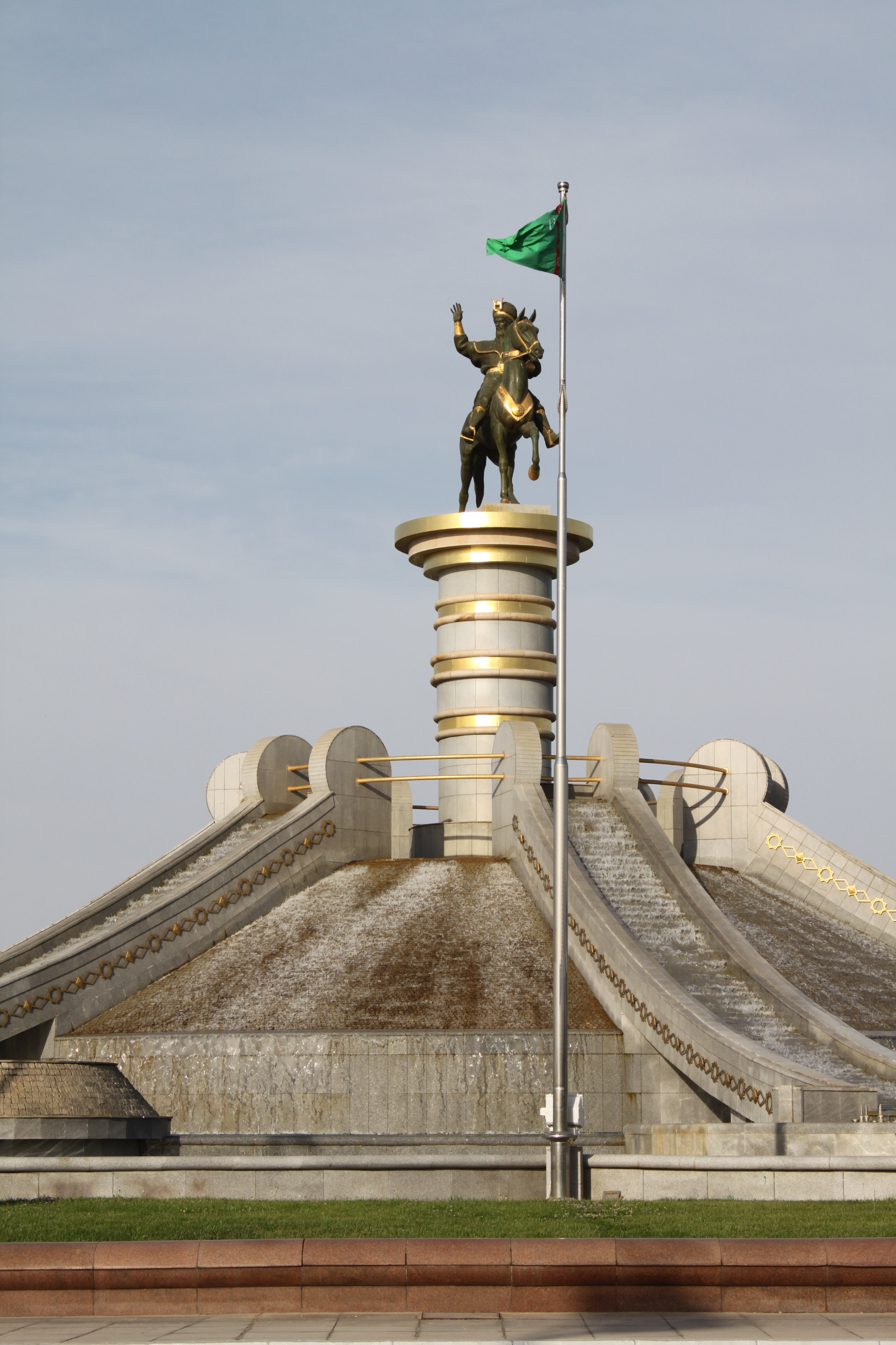 Ashgabat IMG_5820